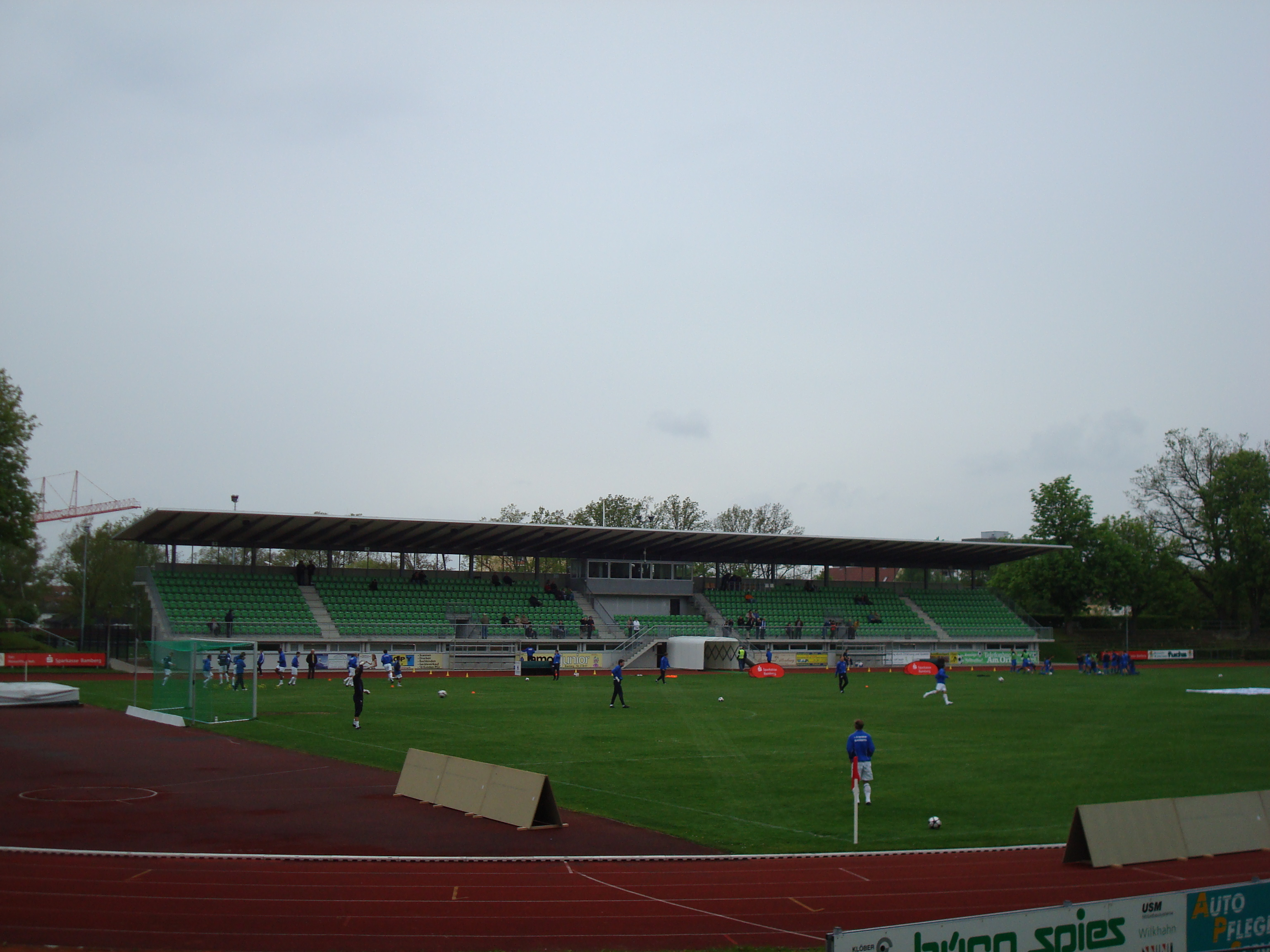 Fuchsparkstadion in Bamberg